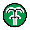 Escudo Fuente del Fresno